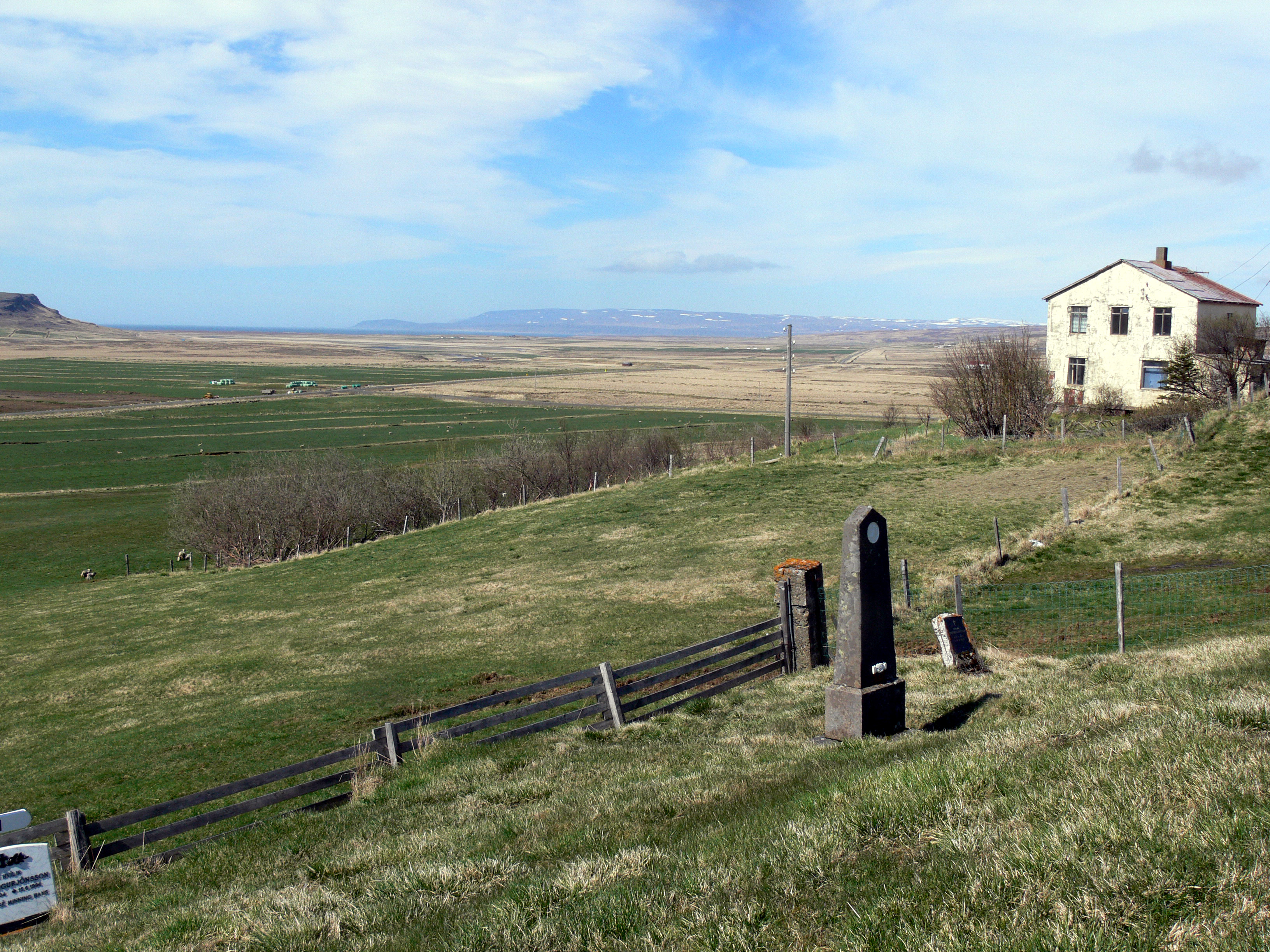 Blick von Sauðafell zum Hvammsfjörður am Horizont. Der Hof beherrschte in früherer Zeit die gesamte Ebene und damit den Zugang zum Südland. Wer von Nordisland nach Südisland wollte, musste an Sauðafell vorbei. 1550 herrschte hier Daði Guðmundsson, der Jón Arason gefangennahm.